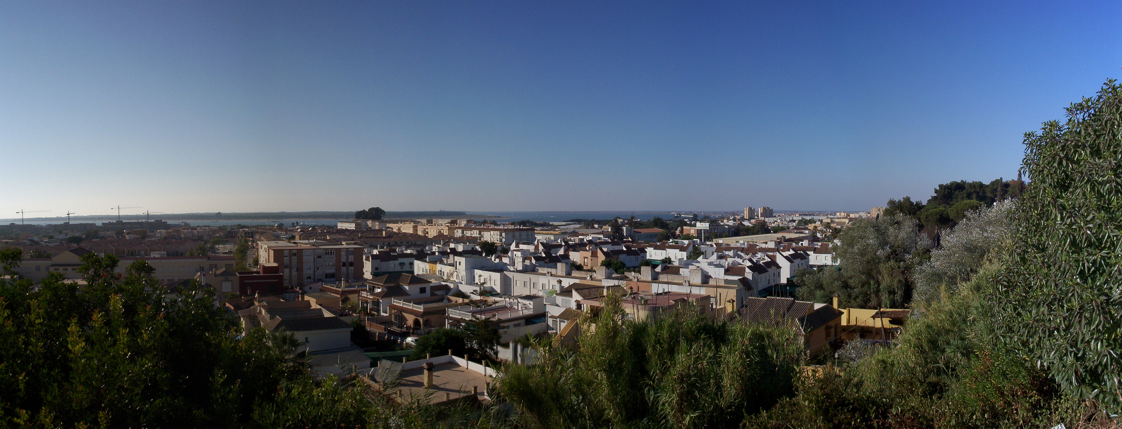 Vista de Sanlúcar y Coto de Doñana.